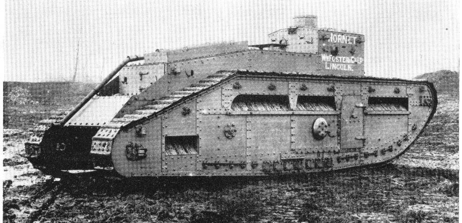 Digitale reproductie foto Medium Mark C tank.